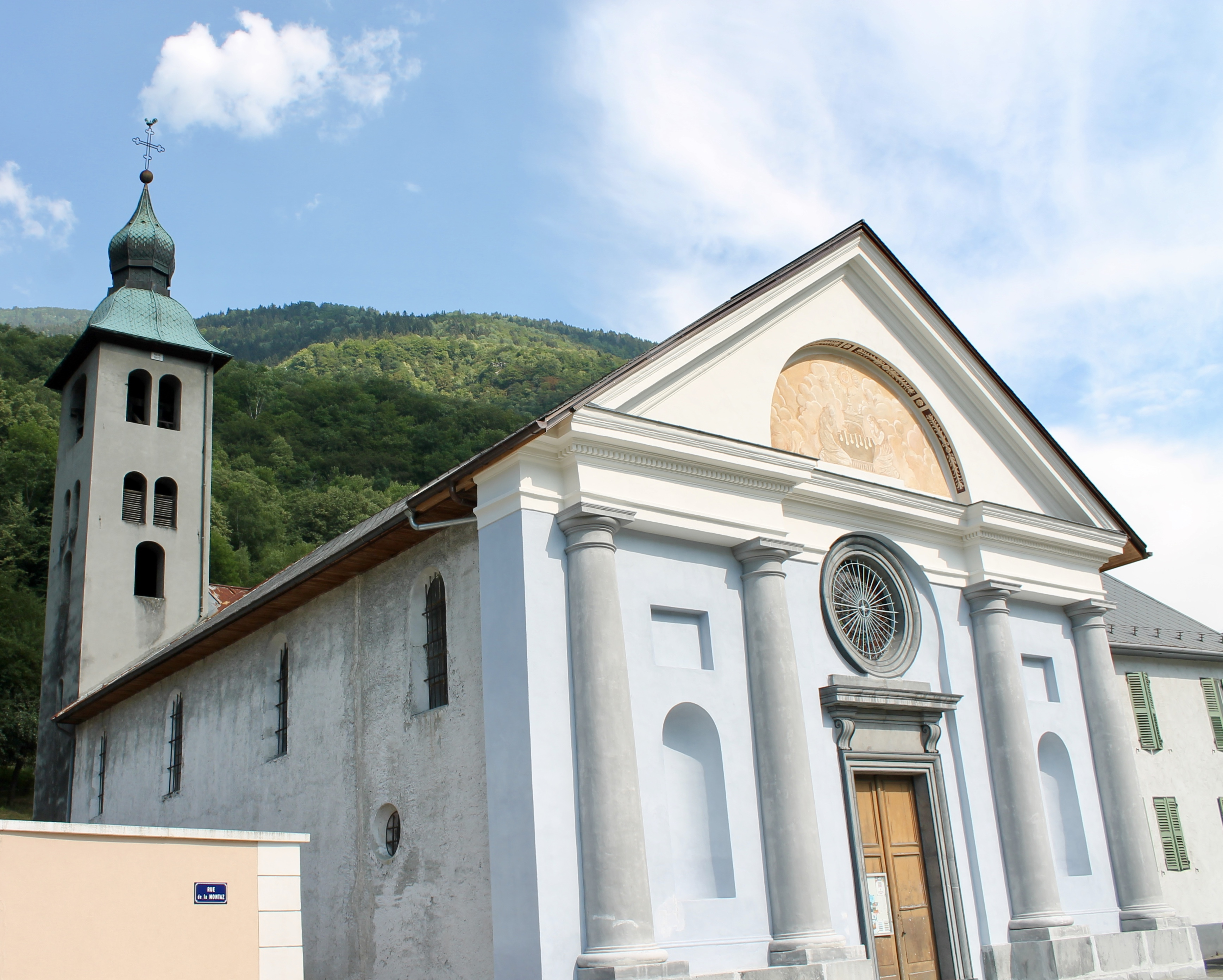 Église Saint-Nicolas de Cevins (juillet 2018).